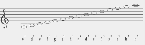 Klucz dyszkantowy